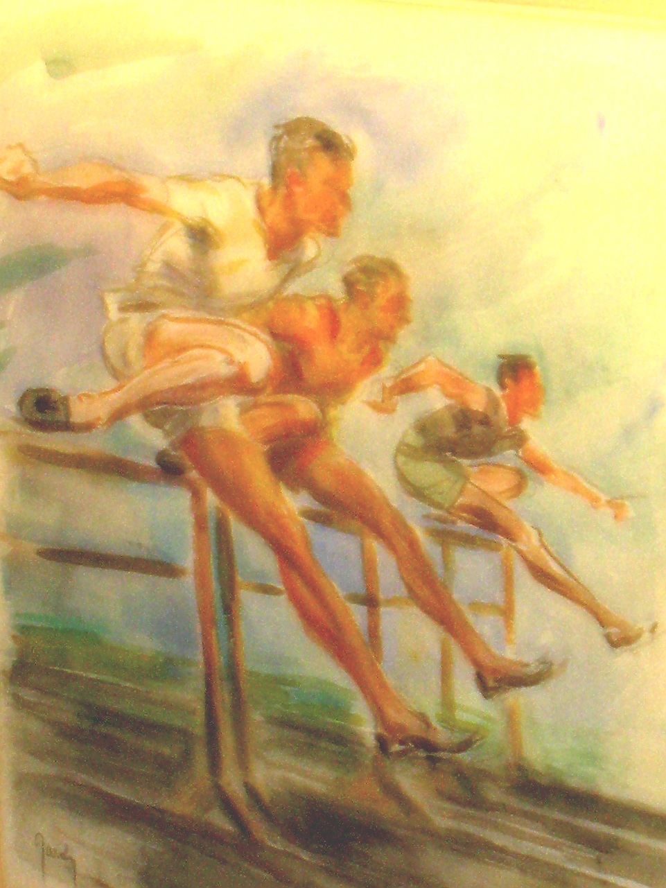 Luxembourgish: Hürdeleefer.